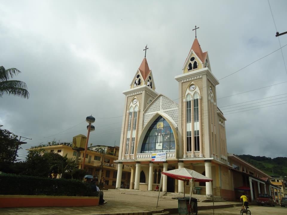 Iglesia catedral de San Jacinto de Alamor, iglesia en cuyas torres se atesora en Reloj de Ocho Esferas, patrimonio del Ecuador y único en el Mundo